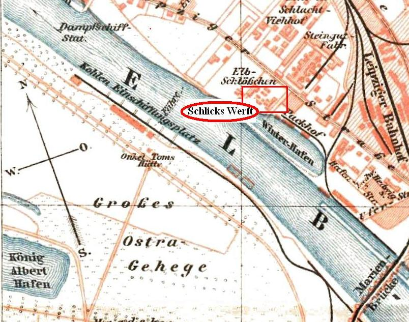 Lageplan der Werft von Schlick, Dresden, Karte 1895